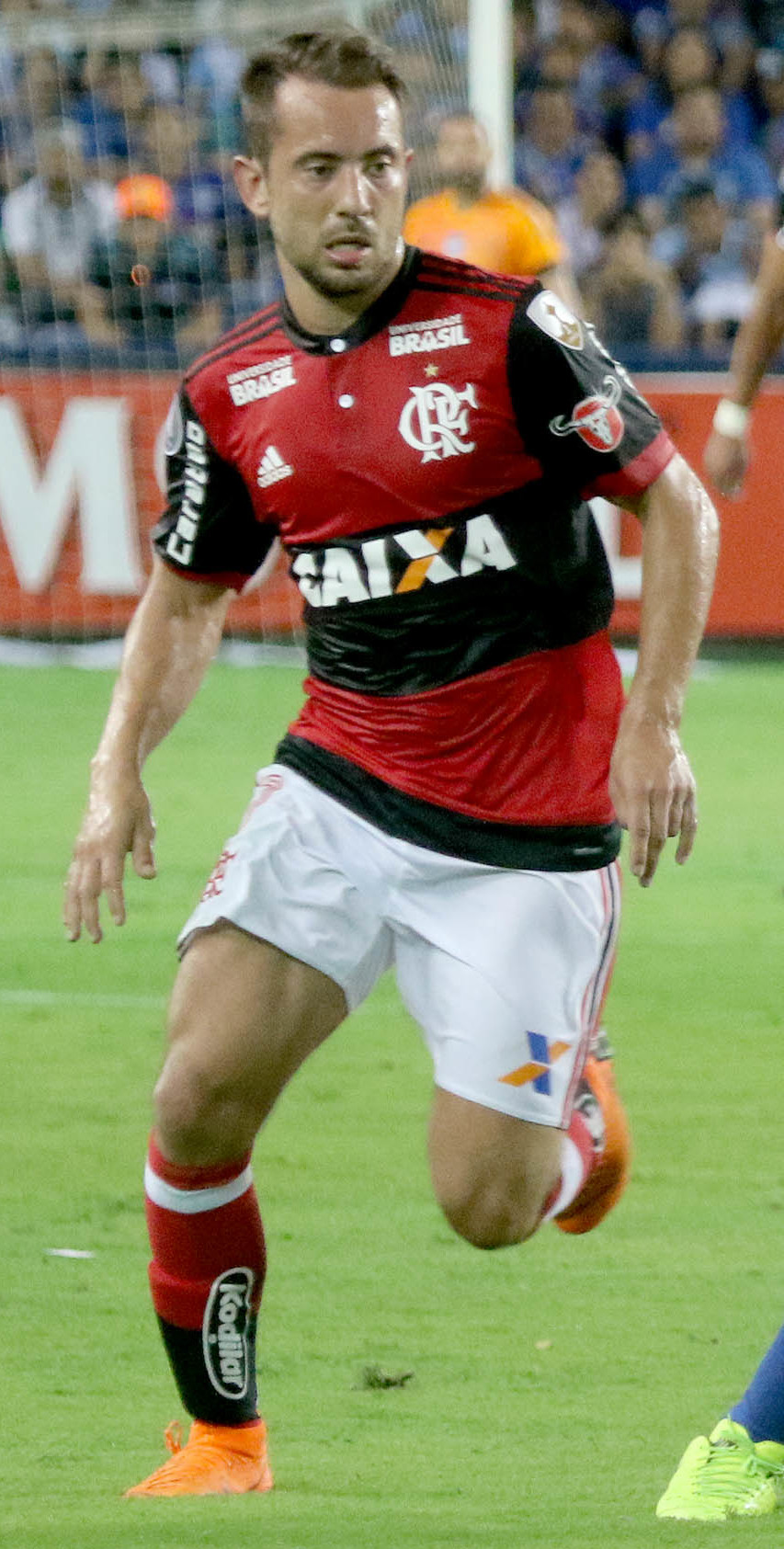 Guayaquil, miércoles 14 de marzo del 2018 (Andes).-En el estadio Capwell, Emelec enfrenta a Flamengo de Brasil, en partido por la segunda fecha del grupo D de la Copa Libertadores. Foto:César Muñoz/Andes